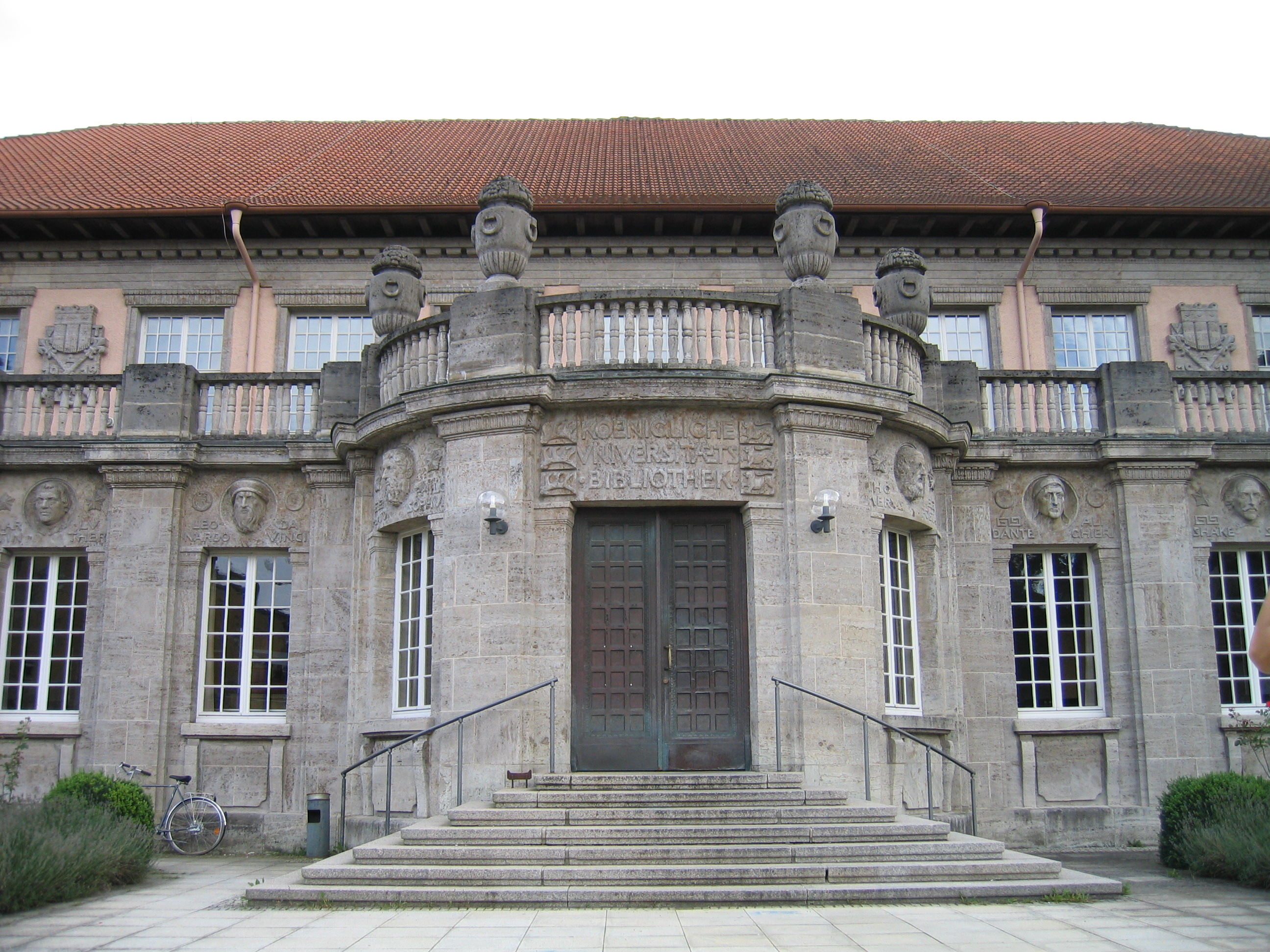 Eingangspartie des „Bonatzbaus“, des ältesten Gebäudes der Universitätsbibliothek Tübingen